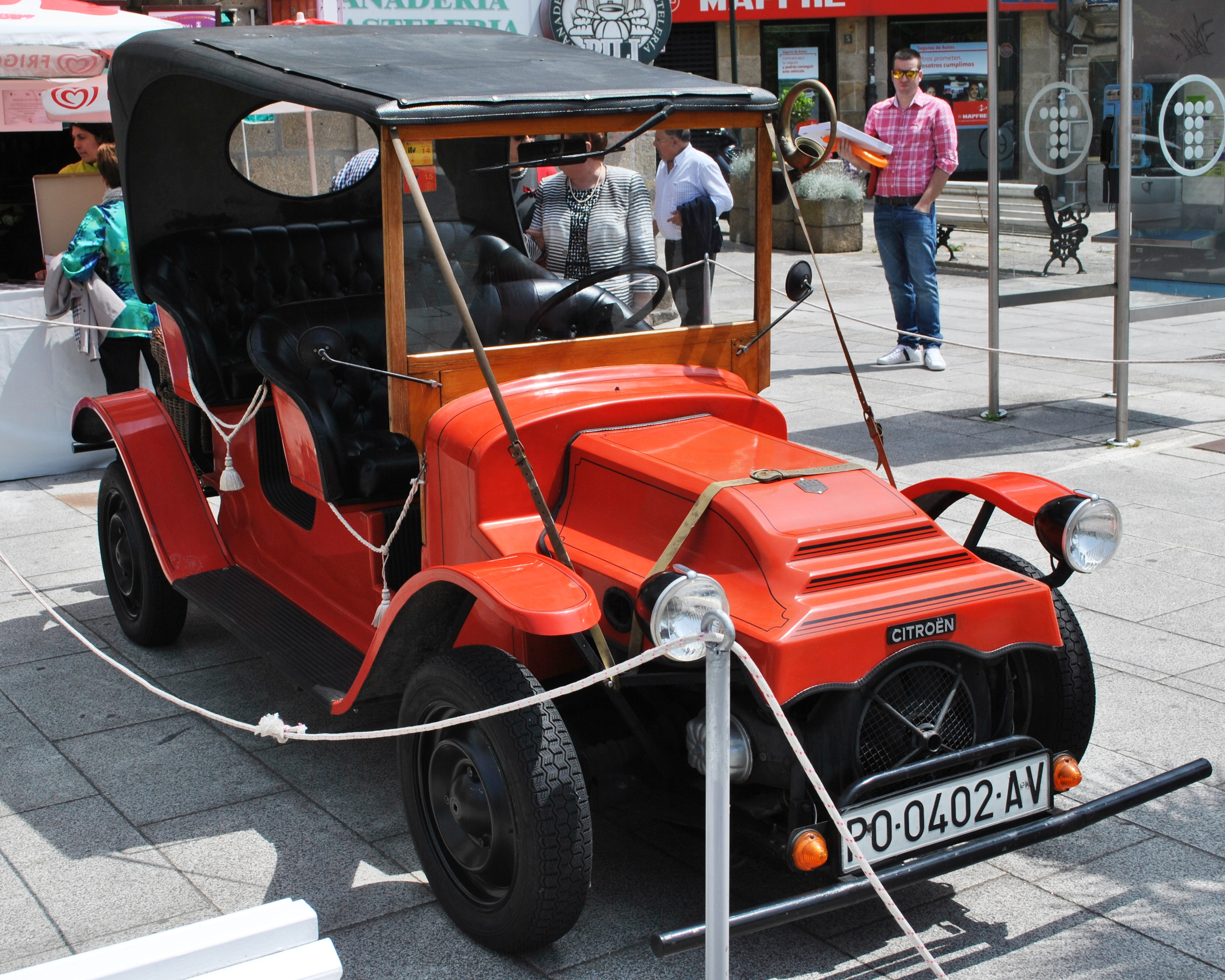 Véxase o título e as categorías.